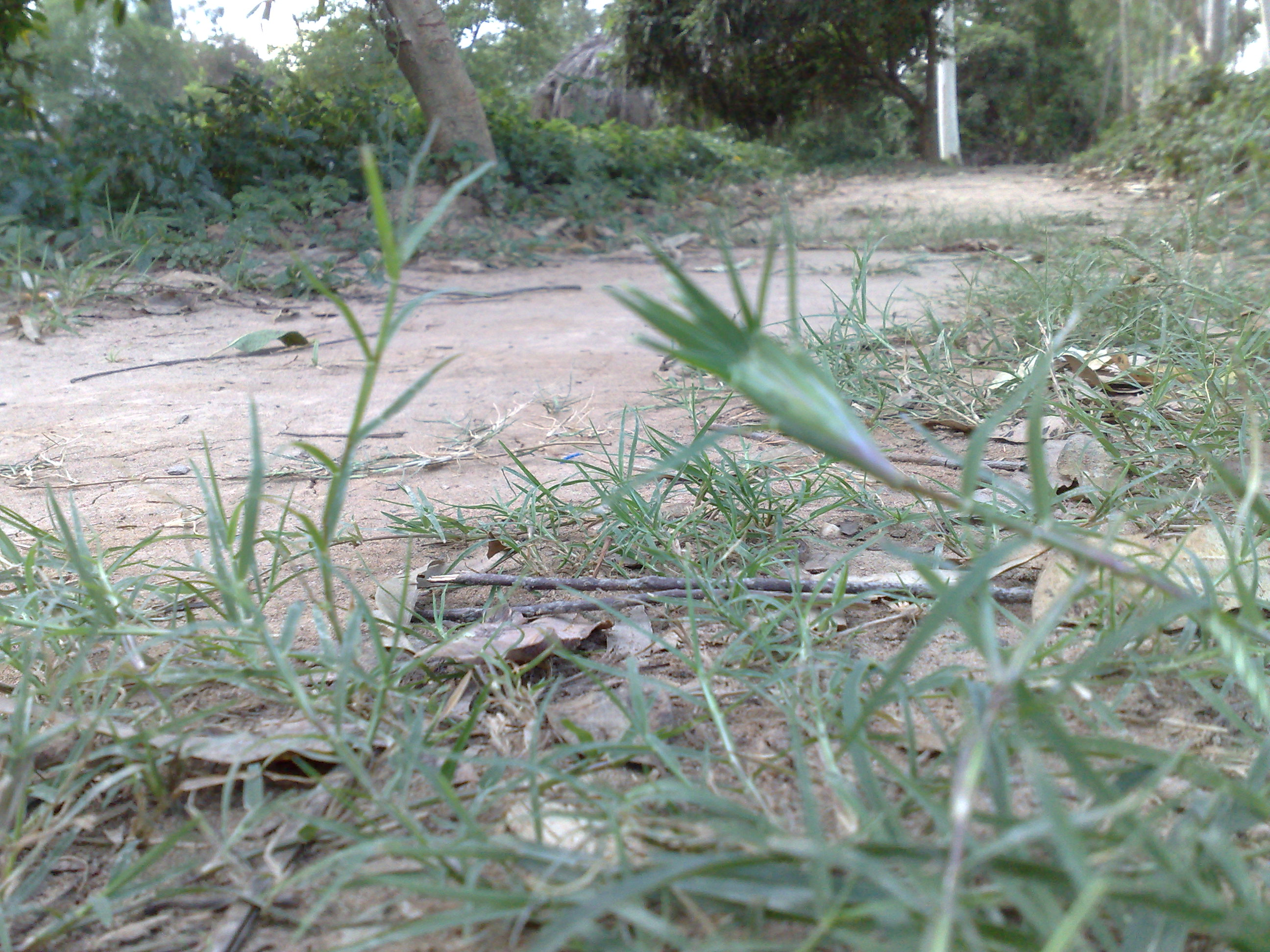 Hình chụp cây cỏ gà, tôi tự chụp và tải lên để minh họa cho bài viết Cỏ gà.